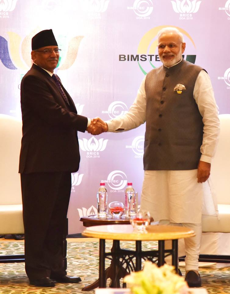 PM Pushpa Kamal Dahal ‘Prachanda’ and I spoke at length about stronger India-Nepal ties during our talks